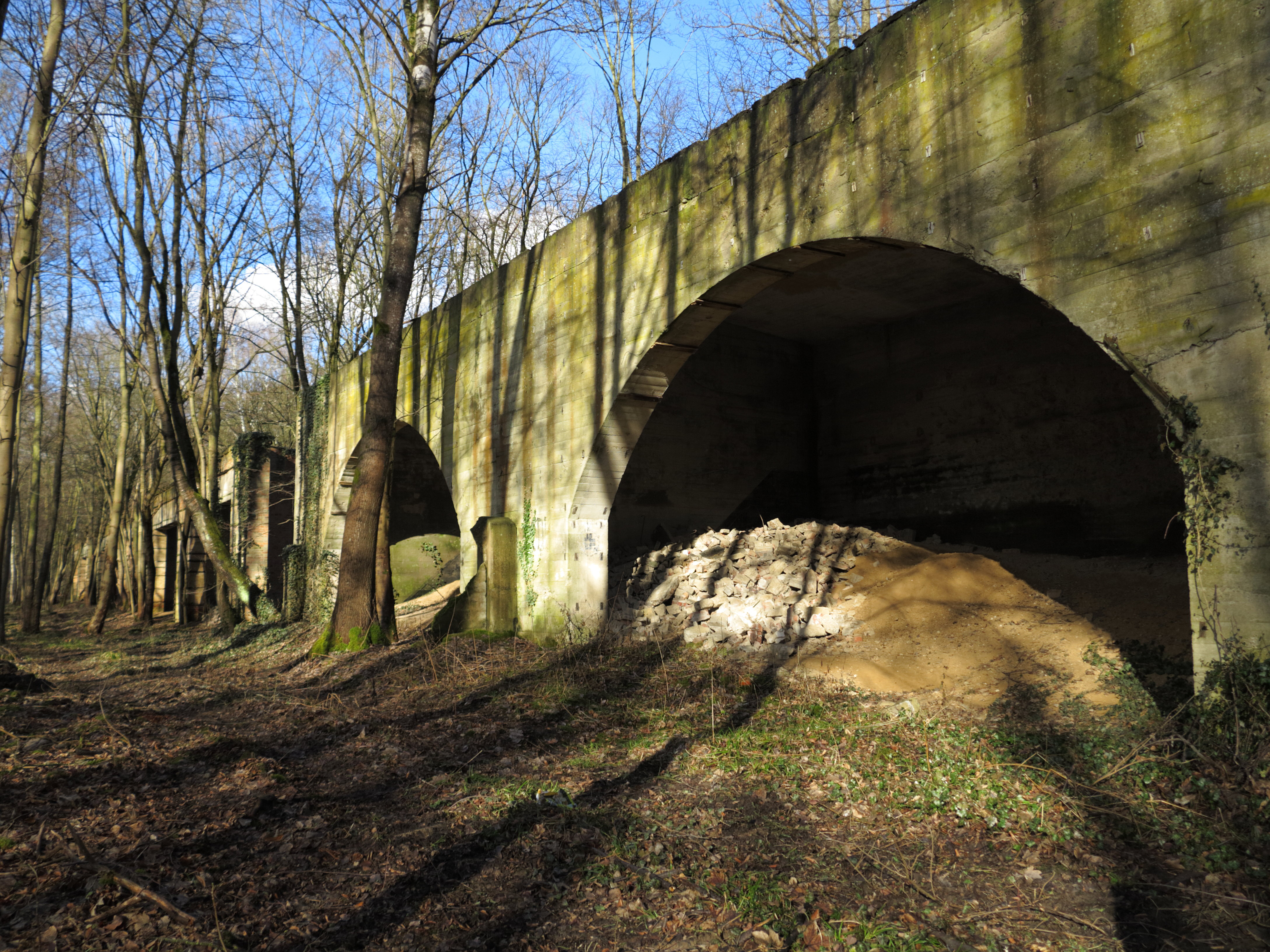 Braunschweig: der ehemalige Kugelfang eines militärischen Schießstandes in der Buchhorst. Im Vordergrund: zwei Beton-Kugelfänge aus den 1930er Jahren. Im Hintergrund: eine Reihe gemauerter Kugelfänge aus der Zeit vor 1900. Die Anlage umfaßt insgesamt 11 Öffnungen mit einer Breite von jeweils 10 m und einer Höhe von 5 m. Ursprünglich waren die Öffnungen zur Verhinderung von Querschlägern mit Holz und Teerpappe verkleidet. In der NS-Zeit fanden hier Erschießungen von Deserteuren, Widerstandskämpfern und Kriegsgefangenen statt.